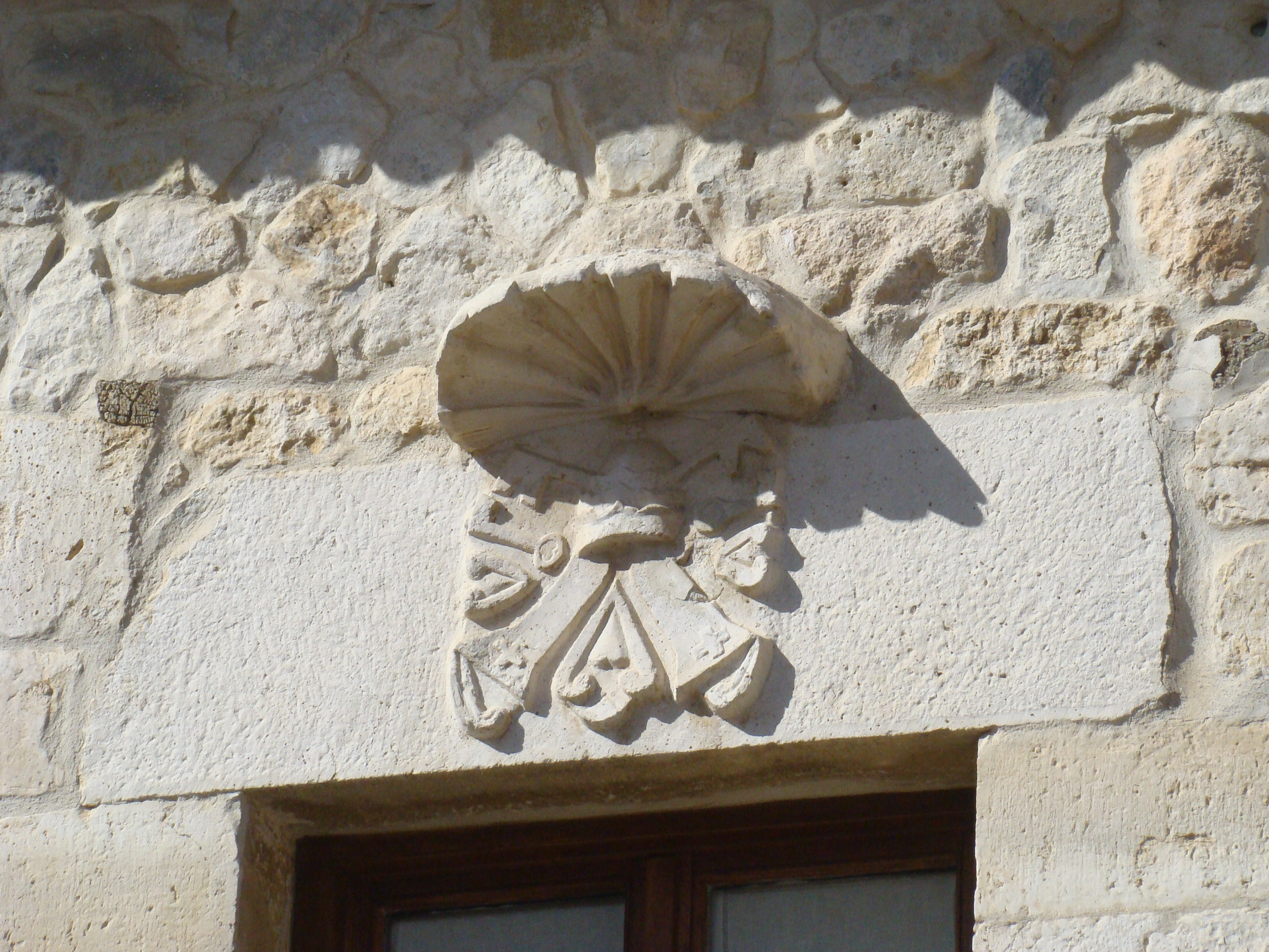 Zaratán, Valladolid (Epaña). Casa rectoral de los beneficiados de la parroquia, convertida después en ermita y casa rural en la actualidad. Pieza en forma de venera volada que protege el emblema: una tiara papal sobre 2 llaves cruzadas.